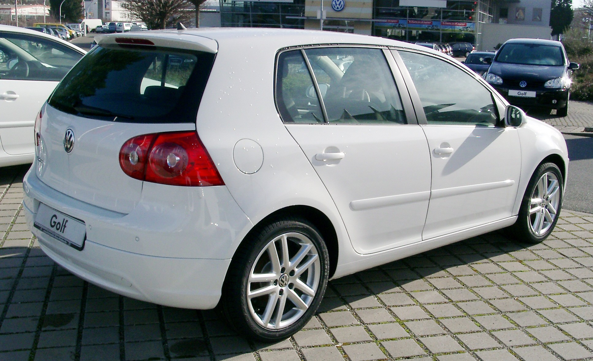 VW Golf V